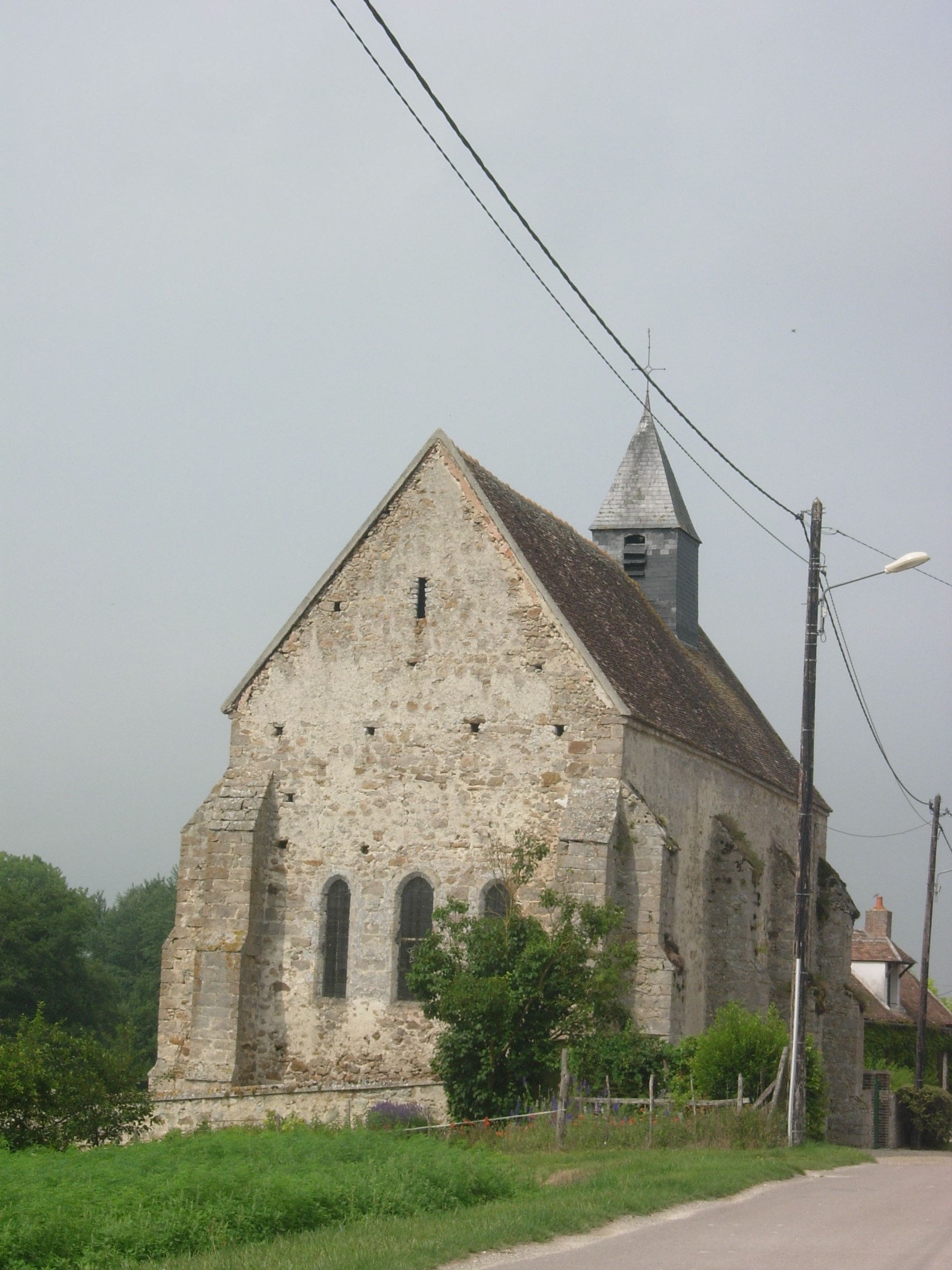 Eglise de Bouy-sur-Orvin